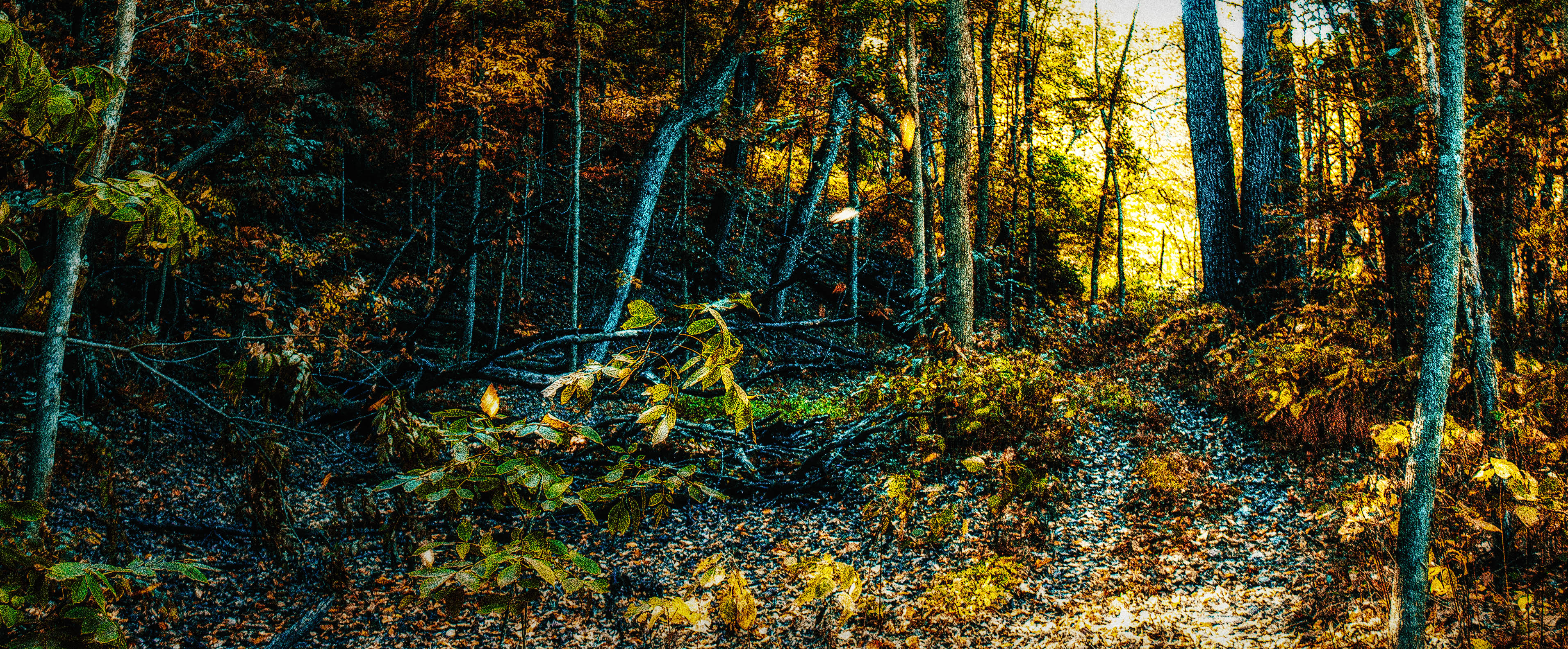 Franklin Creek State Park